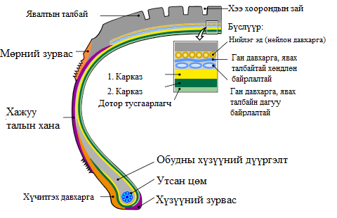 Schematischer Aufbau eines Reifens